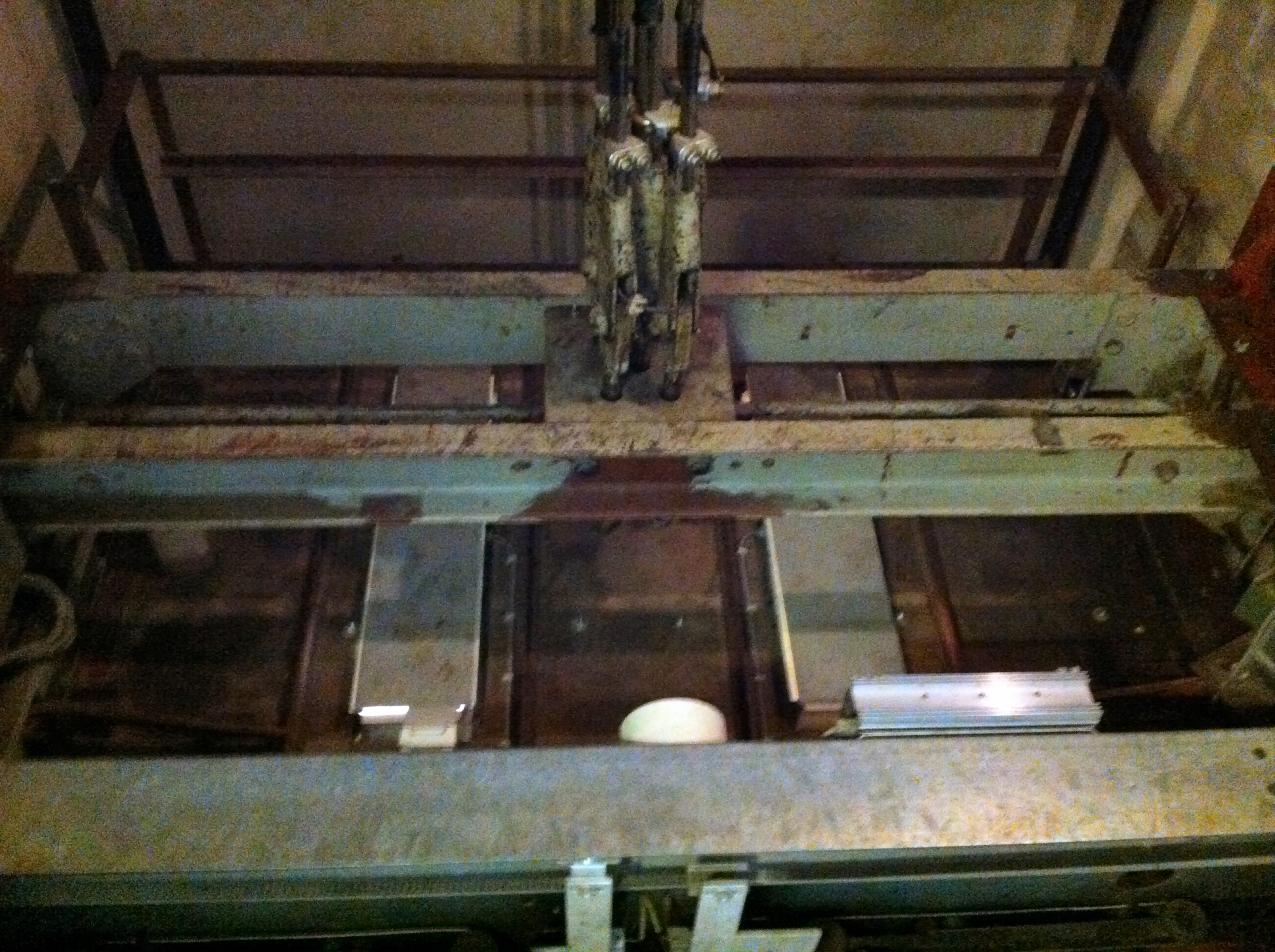 Aufzugskabine - Draufsicht